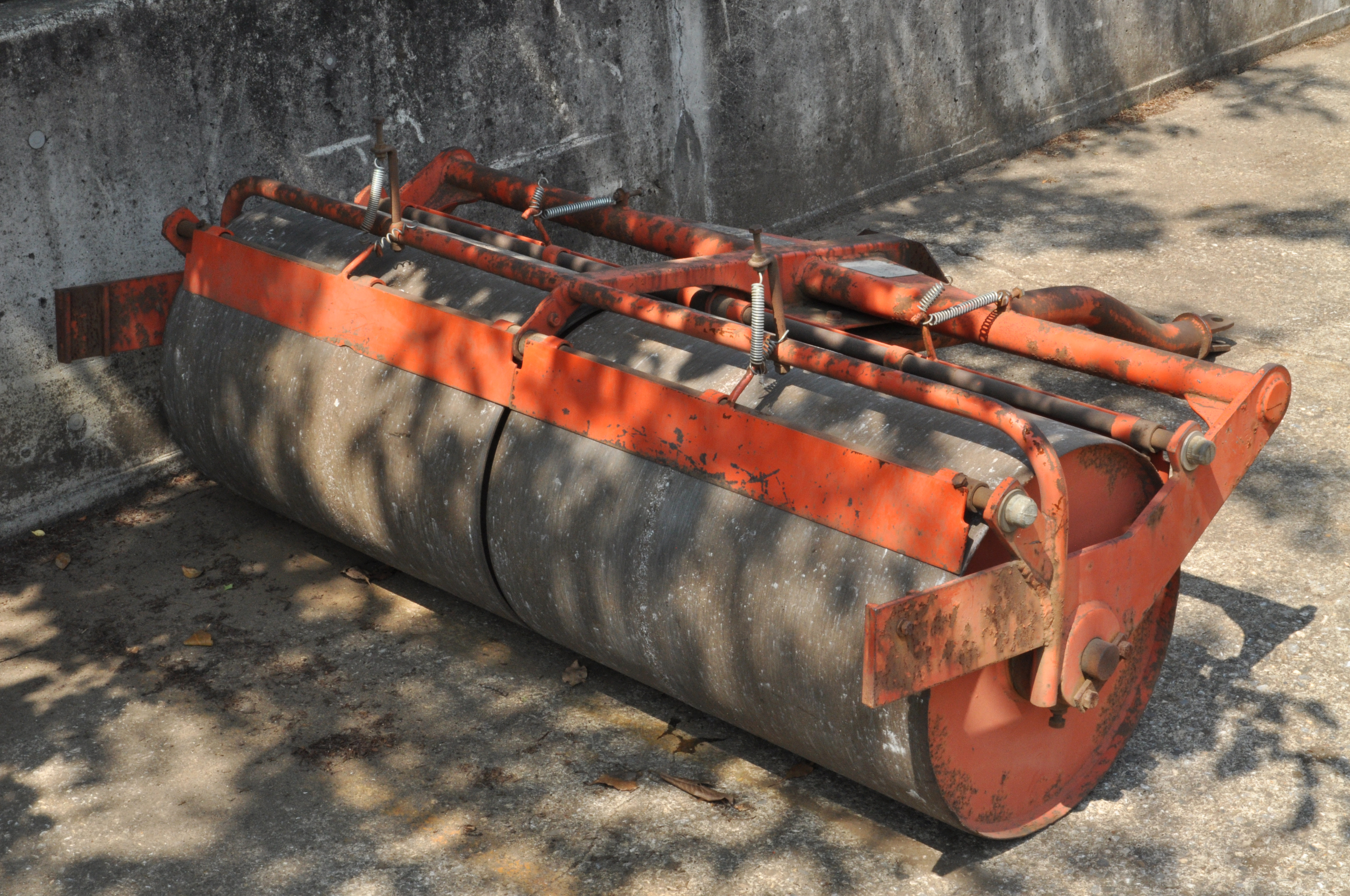 乗り物に取り付けて使用する用途のコンダラ